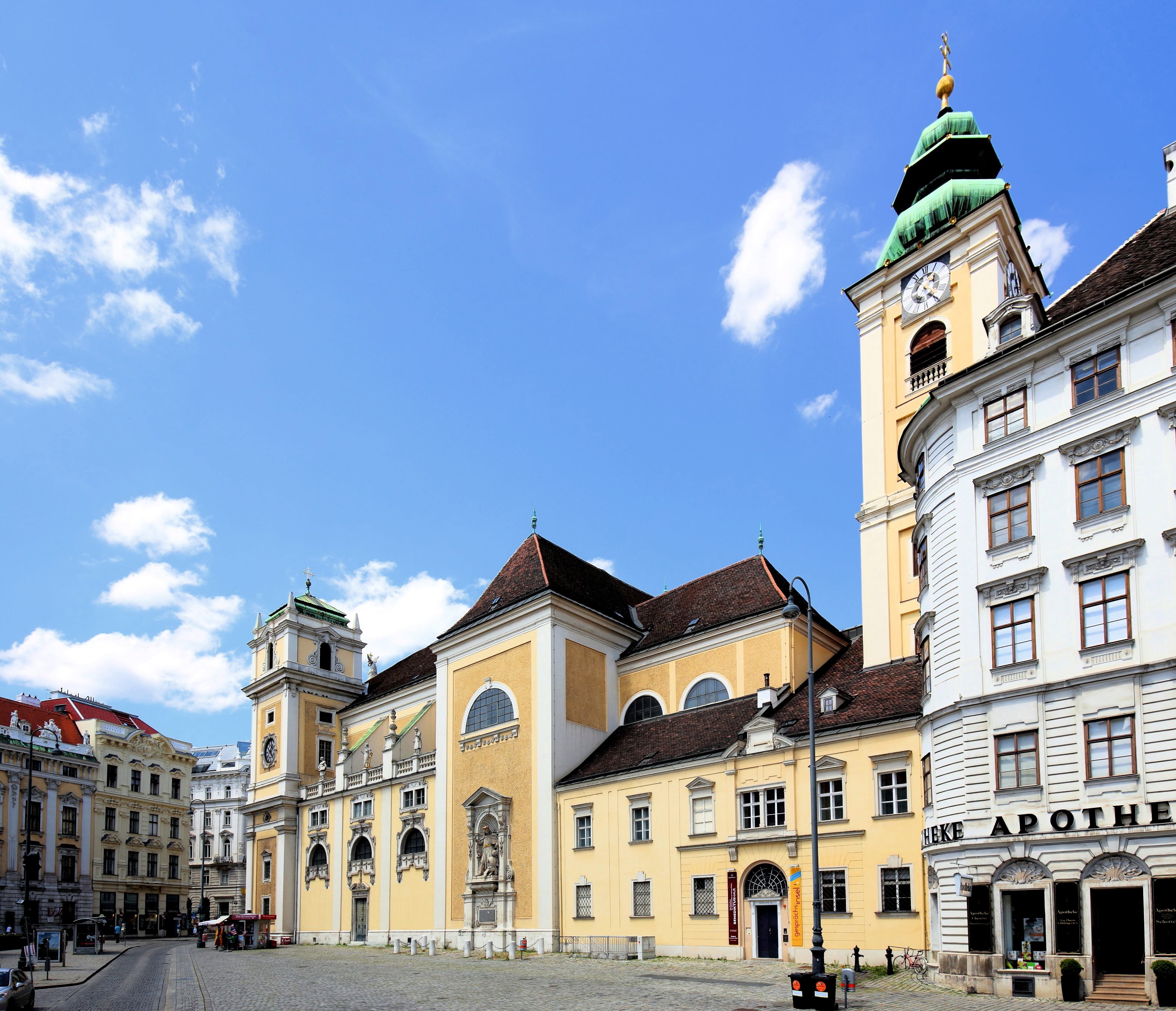 Südostansicht der Schottenkirche im 1. Bezirk der österreichischen Bundeshauptstadt Wien.